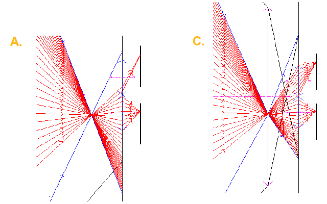 Sans lentille de champ, lorsque l'objet est situé à l'extrémité de l'axe optique, un des capteurs est peu éclairé, les mesures seront donc faussées. L'ajout d'une lentille de champs permet de faire converger les faisceaux lumineux sur tout le capteur, quel que soit l'endroit où il se trouve.